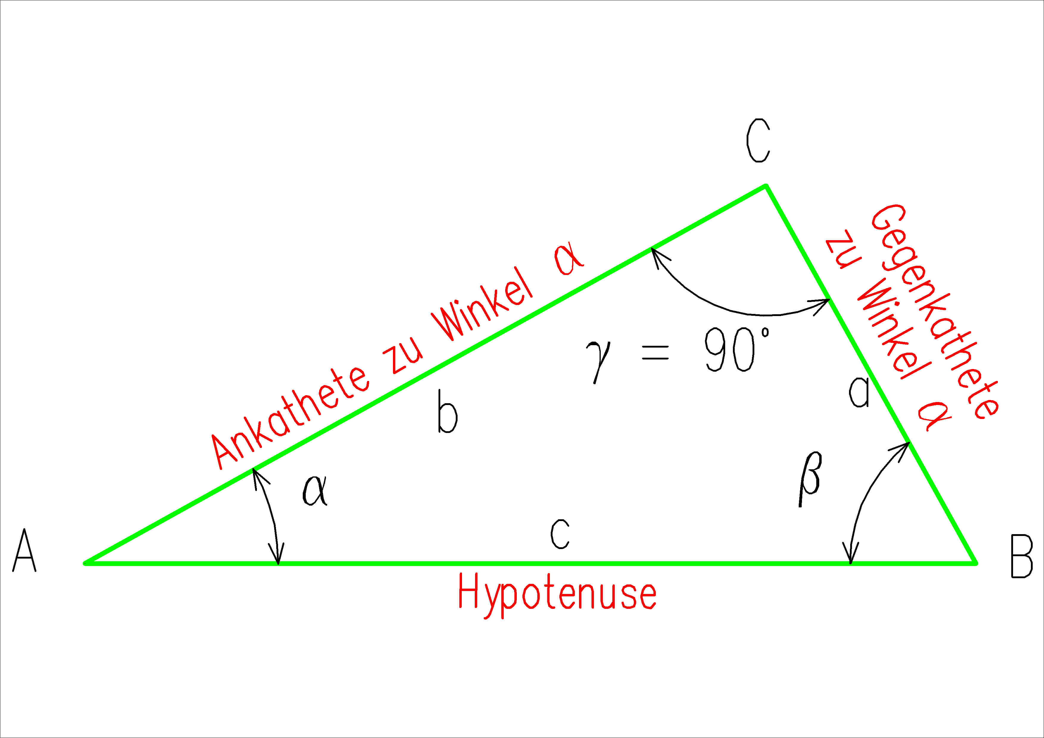 Dreieck